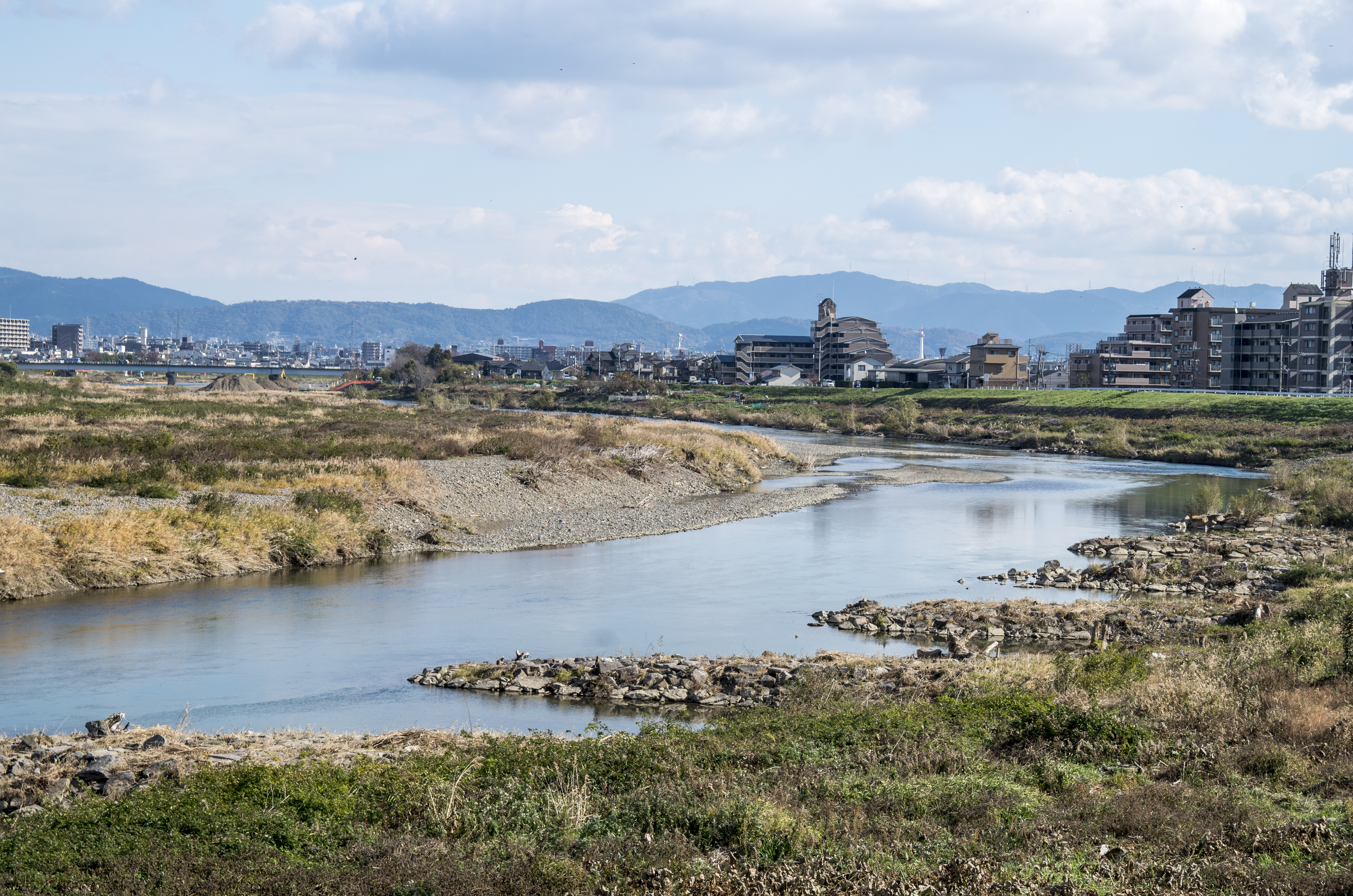 Katsurahatakedacho, Nishikyo Ward, Kyoto, Kyoto Prefecture 615-8004, Japan